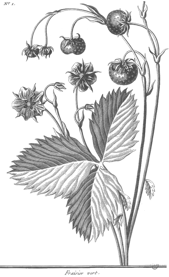 François Rozier, Cours d'agriculture, tome 5, planche 3, figure 1